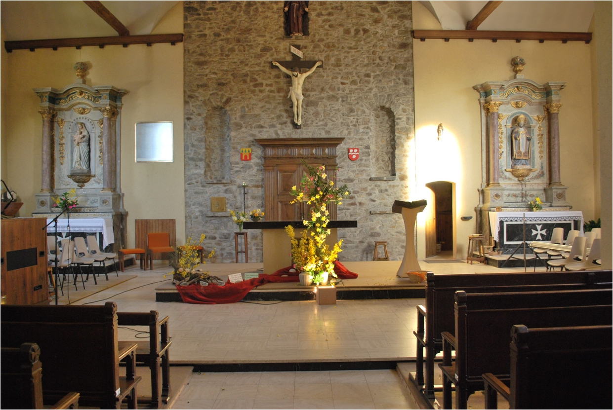 Choeur de l'église Saint-Siméon de L'Huisserie